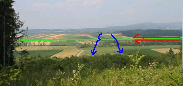 Am 7.April 1945 musste das SS-Panzergrendier Ersatz- und Ausbildungsbataillon das Pinkatal nördlich von Oberwart in westlicher Richtung überqueren und wurde von Oberwart heraus in der Flanke angegriffen